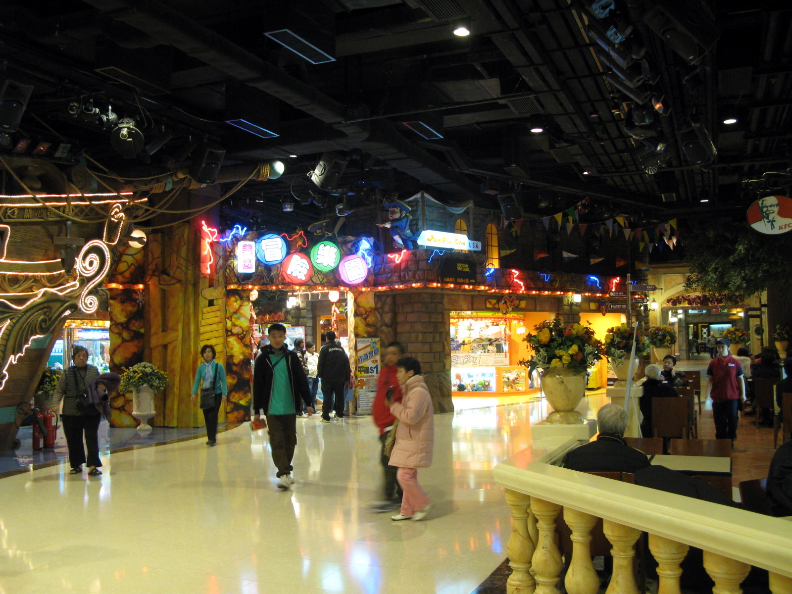 HK Paradise Mall Kidsland